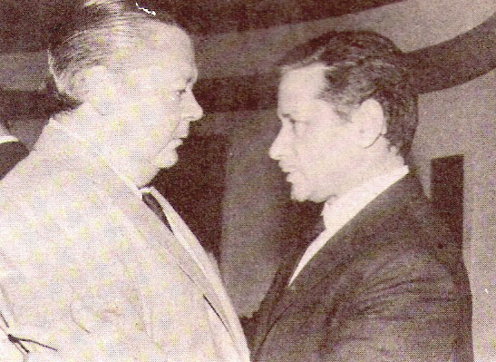 Aníbal Pichuco Troilo (1914-1975) junto a Ben Molar (Moisés Smolarchik Brenner, 1915–).